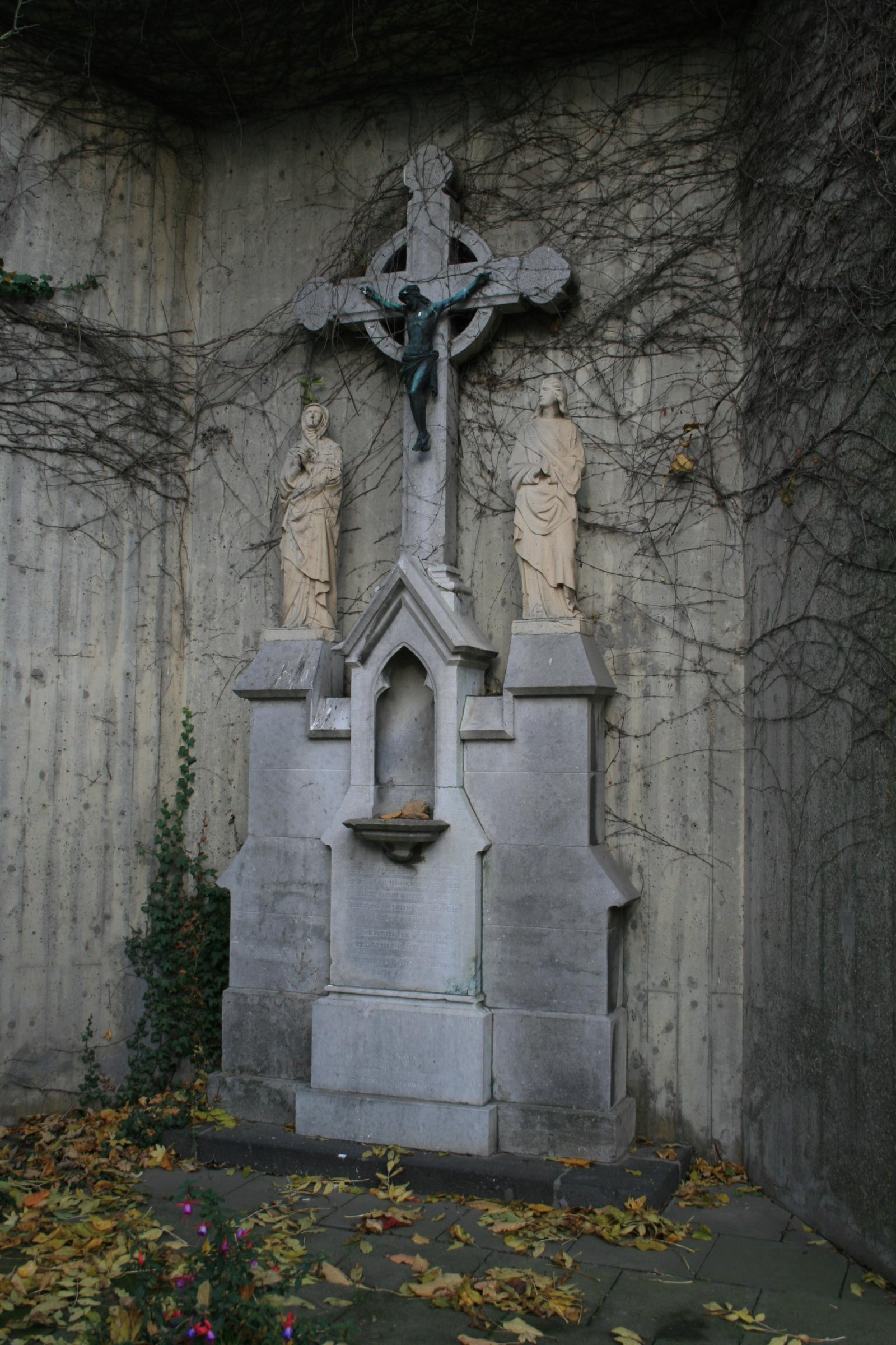 Die Kreuzigungsgruppe stand bis etwa 1969 in Alt-Oberbolheim. Der Ort wurde abgerissen.